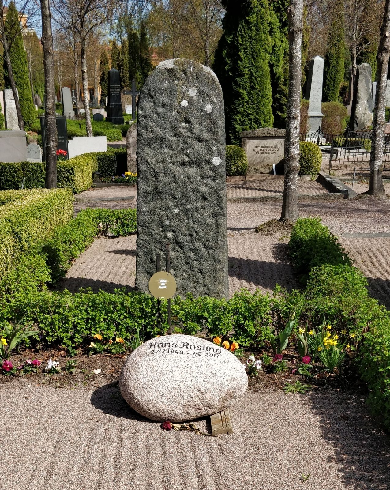 Kvarter 16 Gravplats 0836B